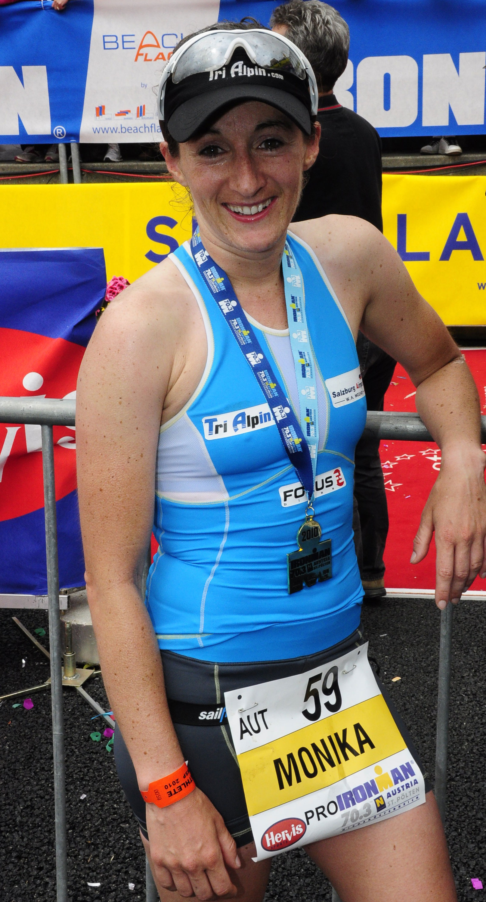 Monika Stadlmann – Ironman 70.3 Austria 2010, Zielbereich